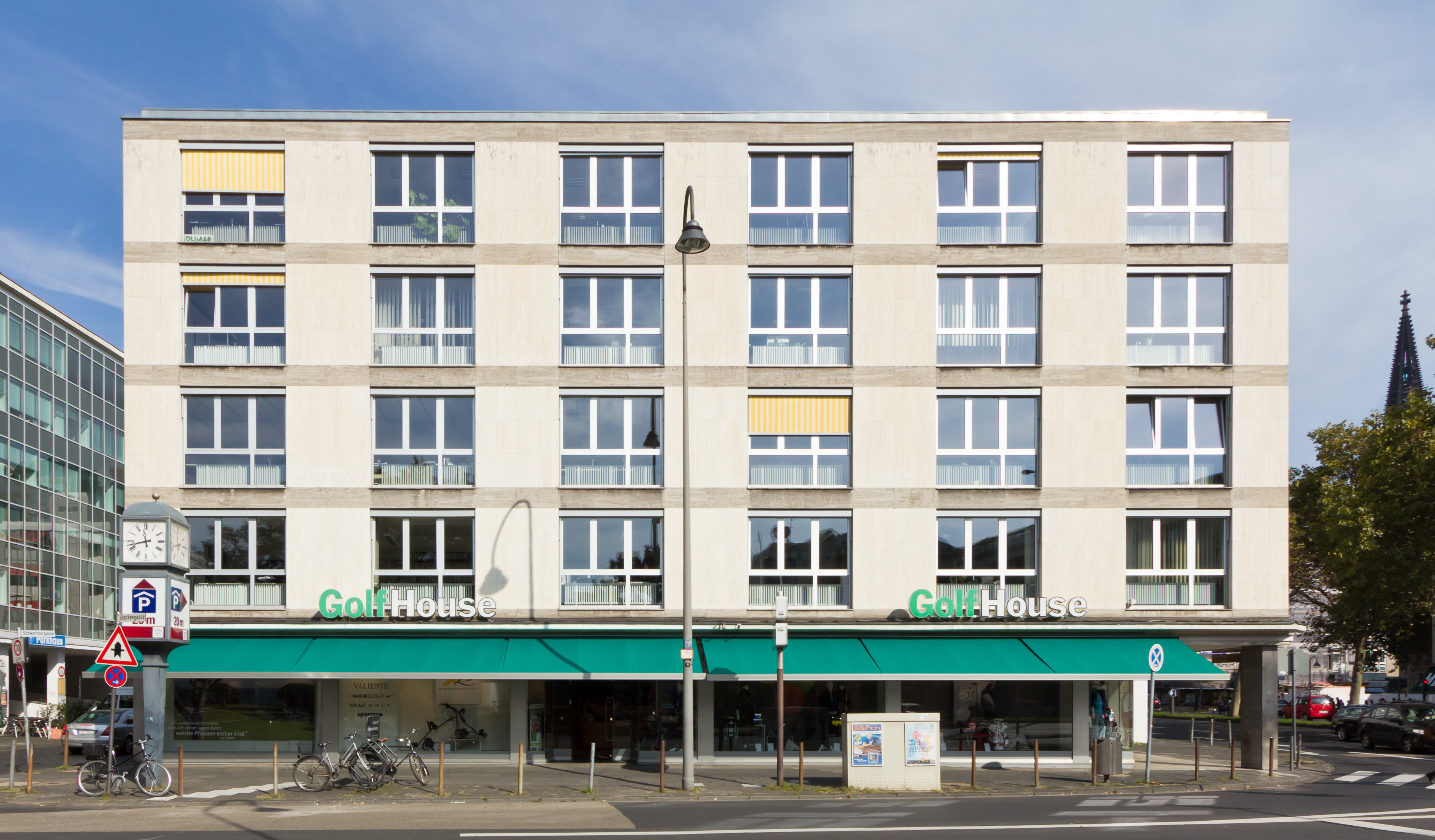 Denkmalgeschütztes Büro- u. Geschäftshaus „Haus Schwabenland“. Architekt: Wilhelm Koep, Baujahr: 1961/62